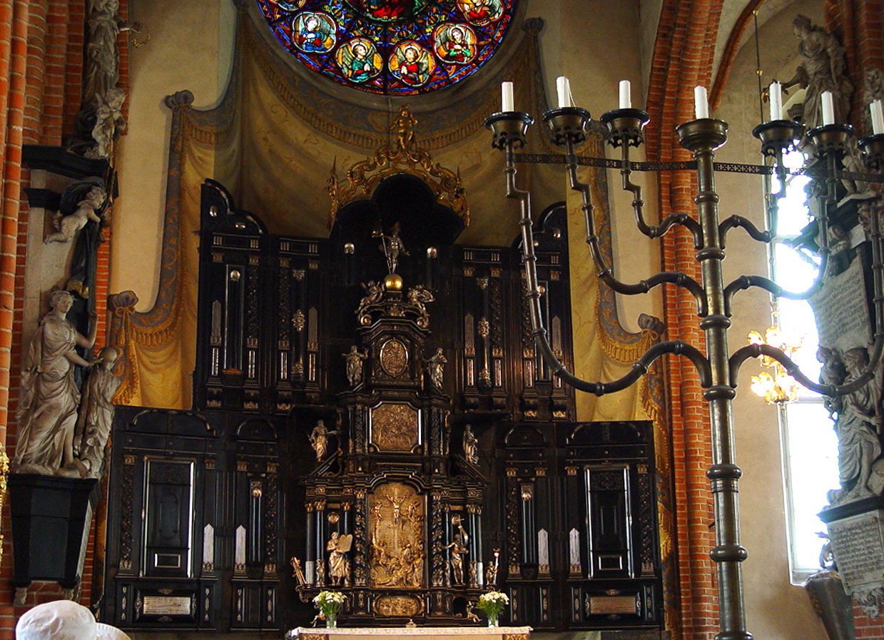 Storkyrkan in Stockholm, Gamla stan.